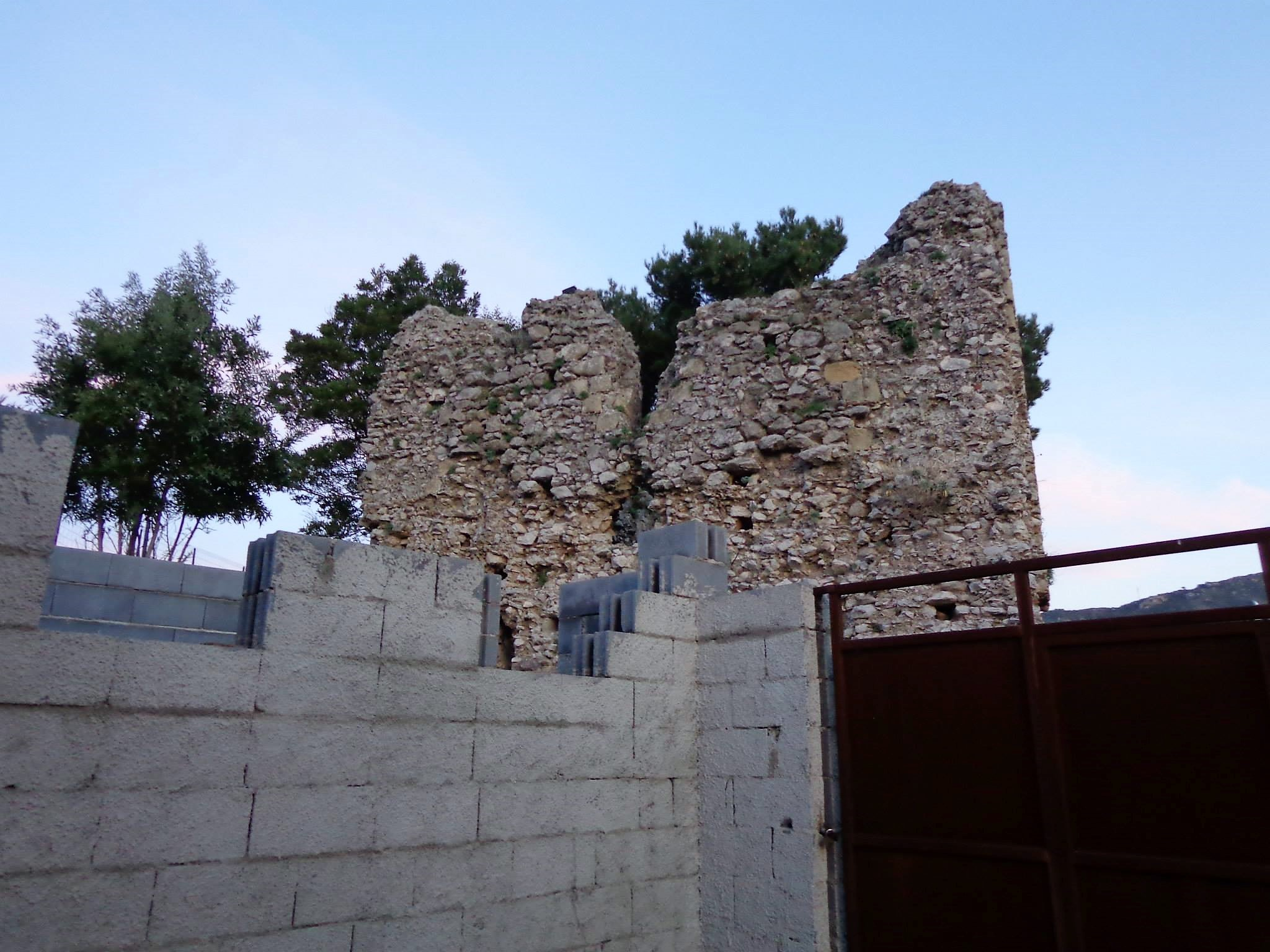 Castello di Novara di Sicilia, ruderi. Natale 2015, scatto già presente su profilo personale FB.